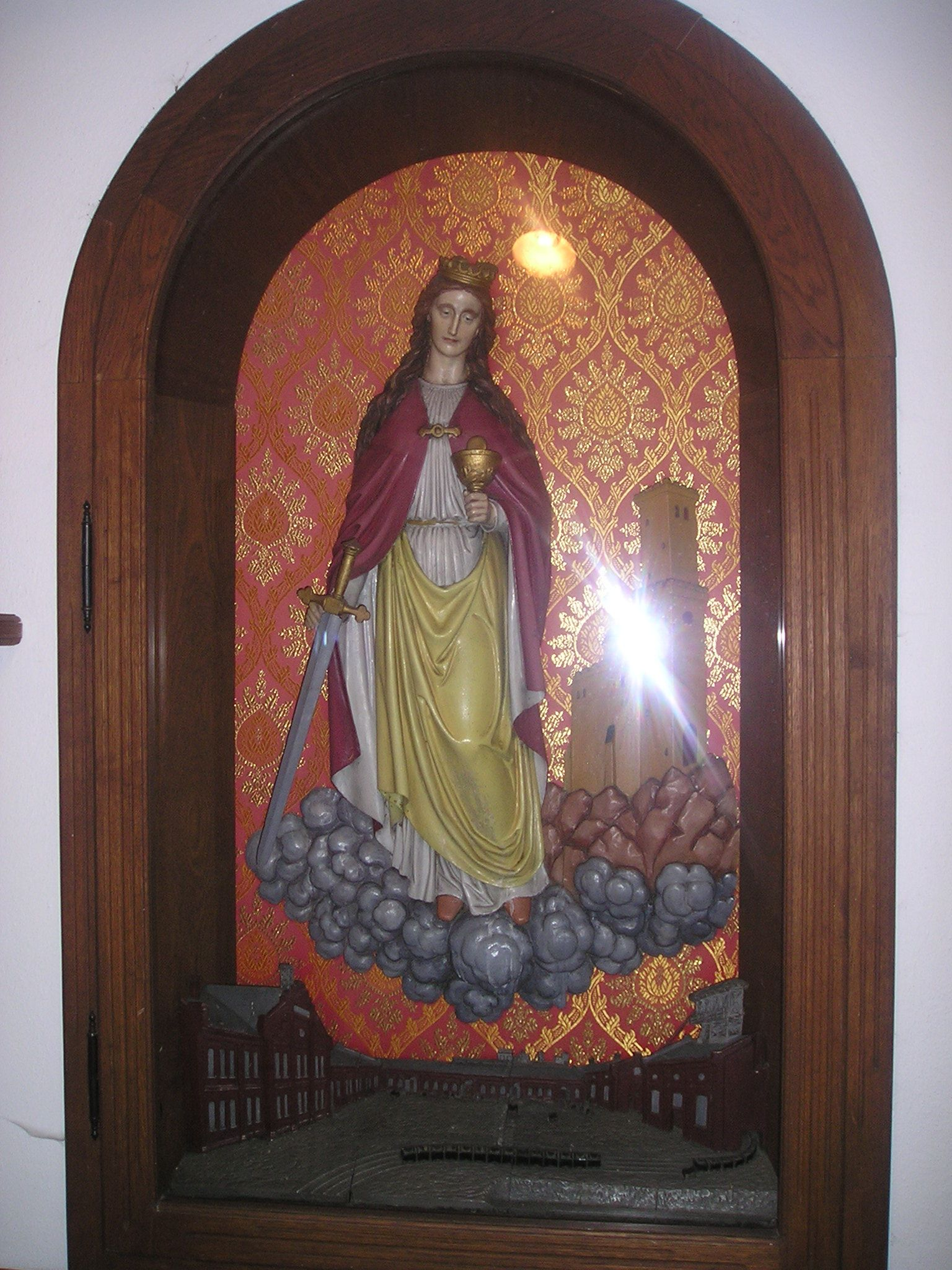 Výzdoba kaple sv. Barbory Ostrava-Petřkovice, Hornické muzeum